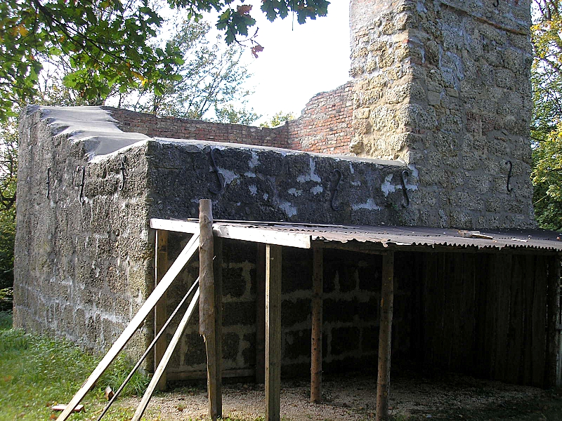 Burg Bocksberg (Bocksberg, Gemeinde Laugna, Bayerisch-Schwaben). Die Ruine des Bergfriedes. Eigene Aufnahme, Sept. 2007 / Bocksberg castle near Laugna (Bavaria, Germany). The ruins of the keep. Own photo, Sept. 2007